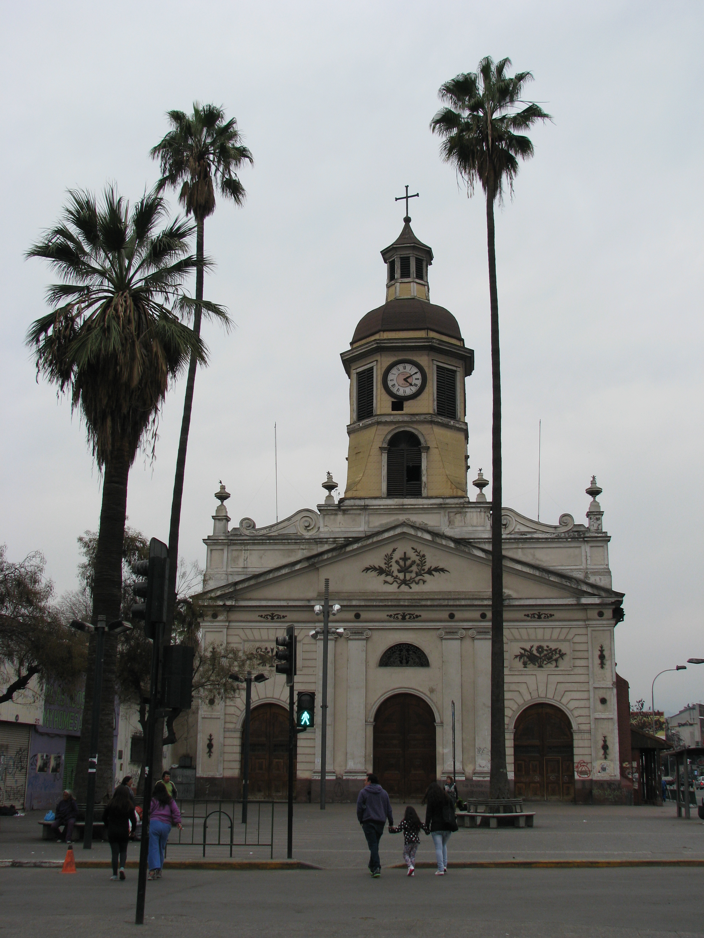 Iglesia y convento de la Recoleta Franciscana This is a photo of a national monument in Chile: 215